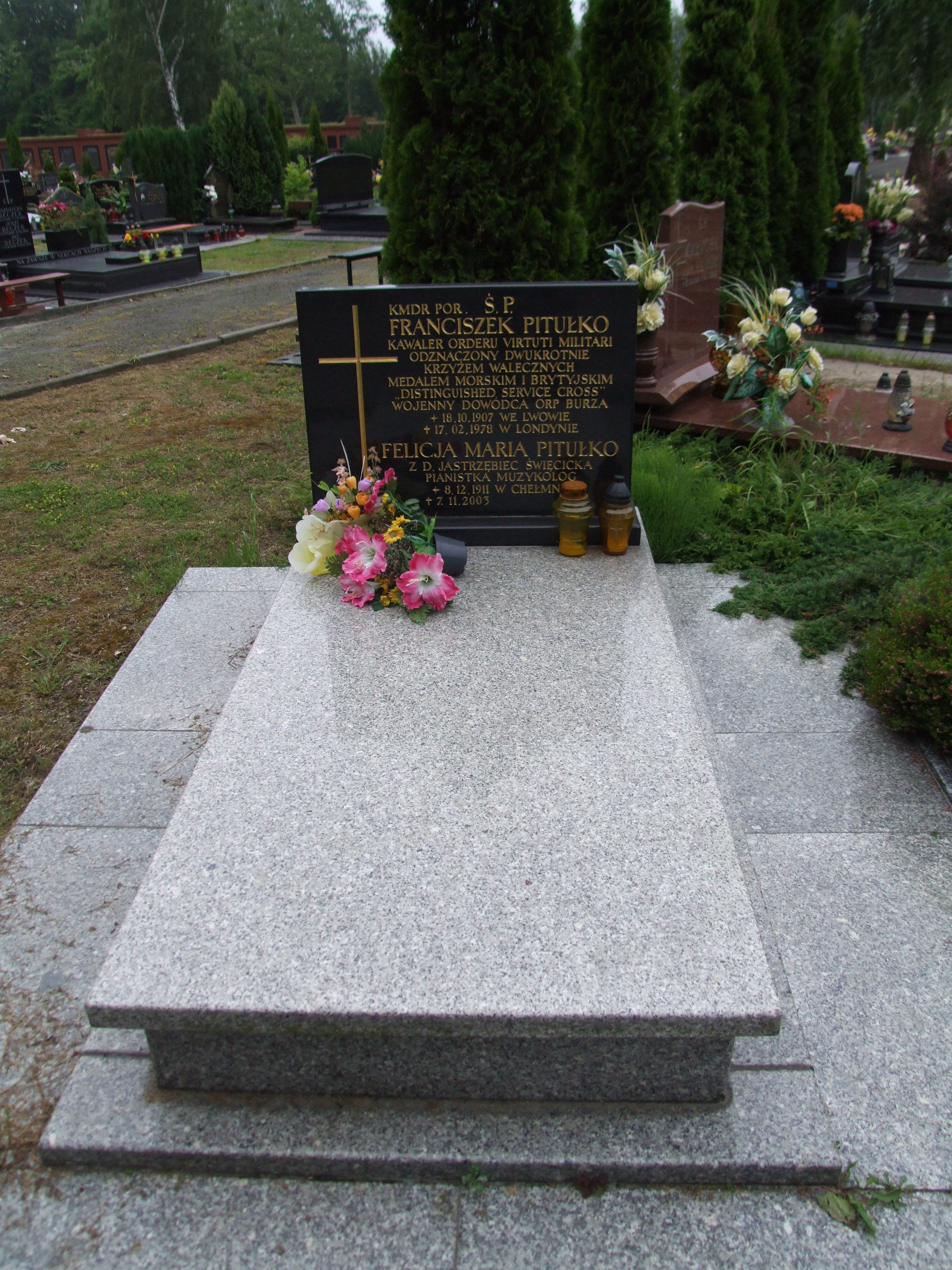 Gdynia-Oksywie Cmentarz Marynarki Wojennej